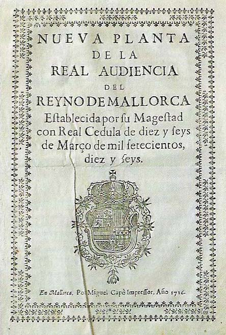 Nueva Planta de la Real Audiencia del Reino de Mallorca